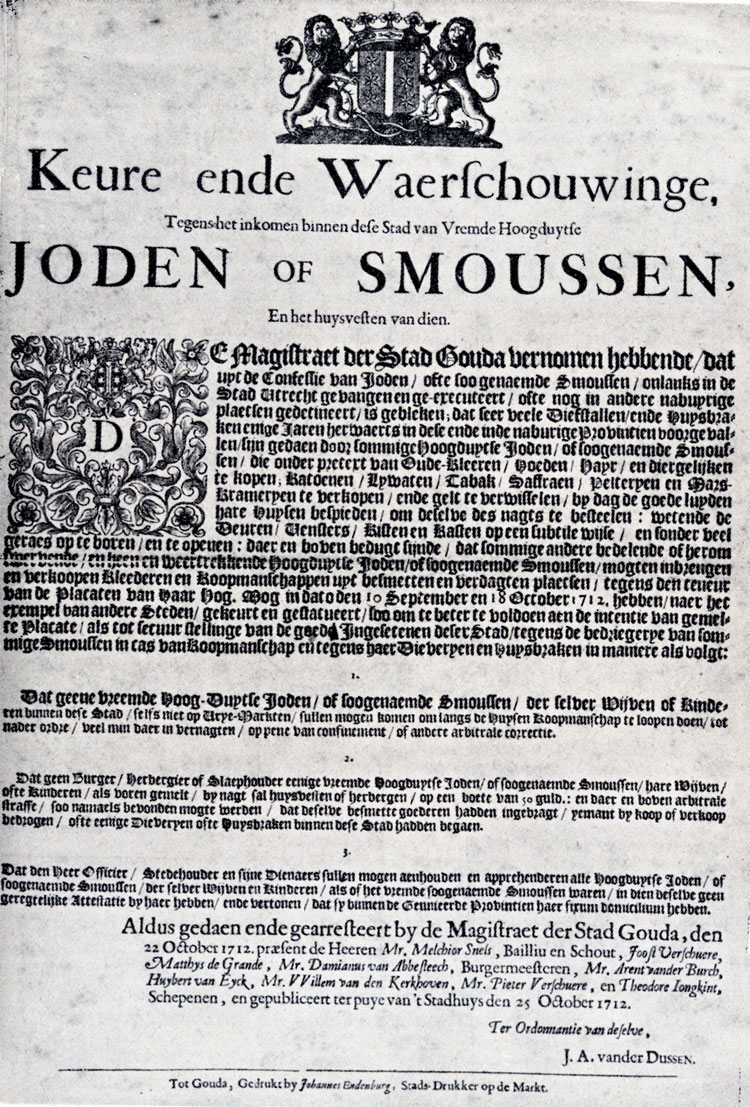 Keur van Gouda uit 1712 tegen de vestiging en huisvesting van Duitse Joden